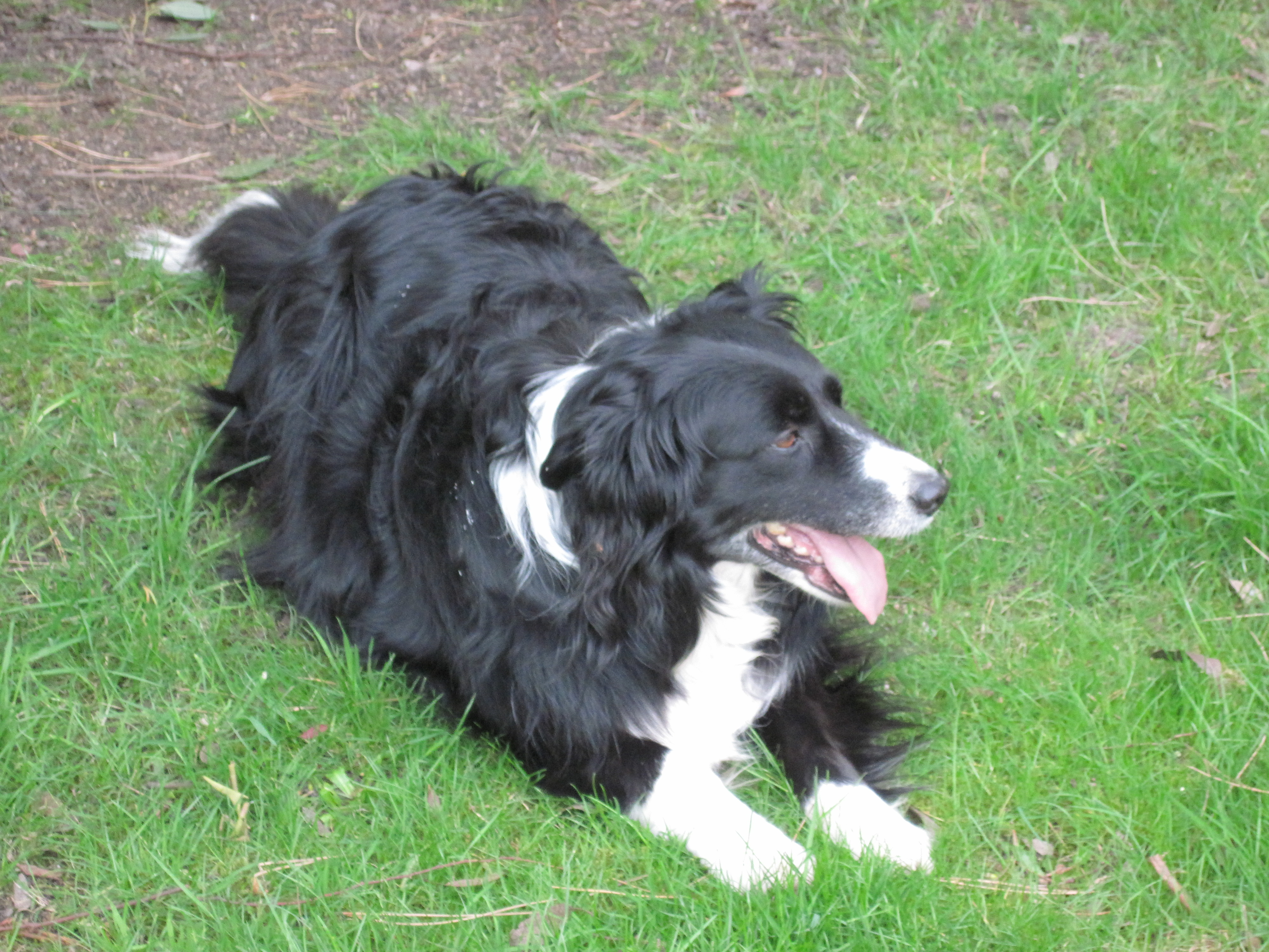 Cóilí.